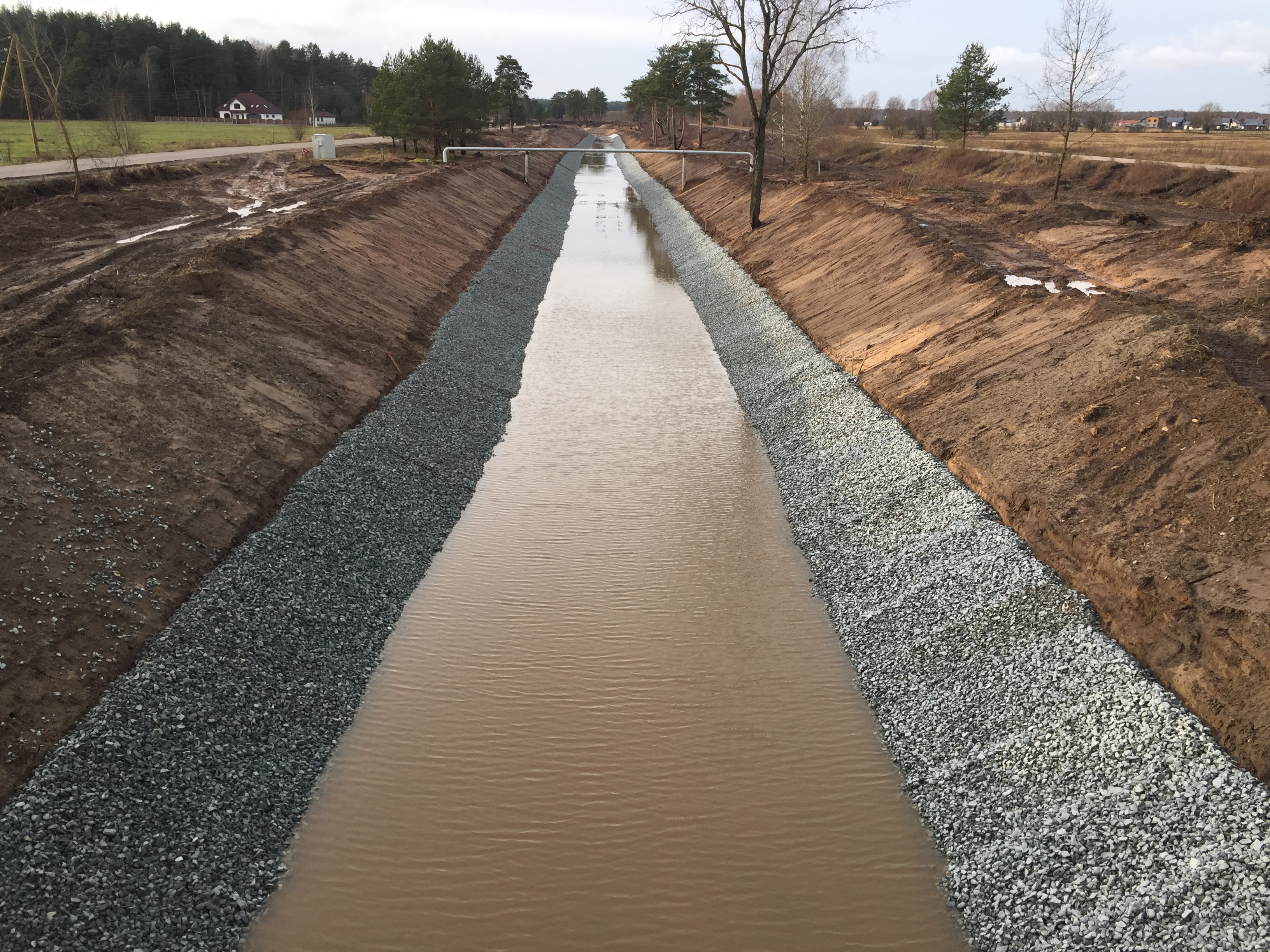 Gaujas-Baltezera kanāls no tilta rietumu virzienā, 2019-12-08